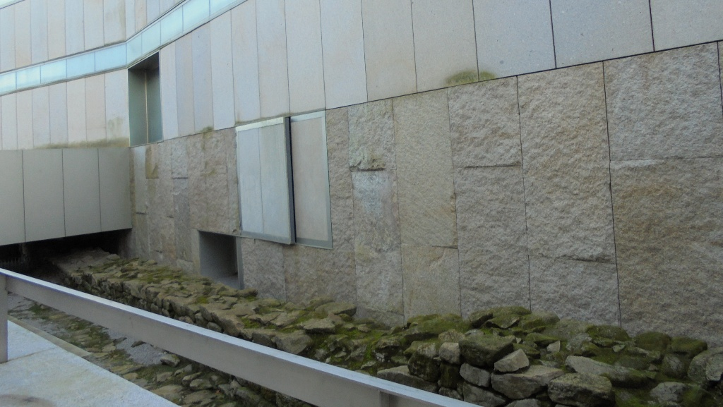 Restos de la muralla de Pontevedra al lado del Sexto Edificio del museo de Pontevedra